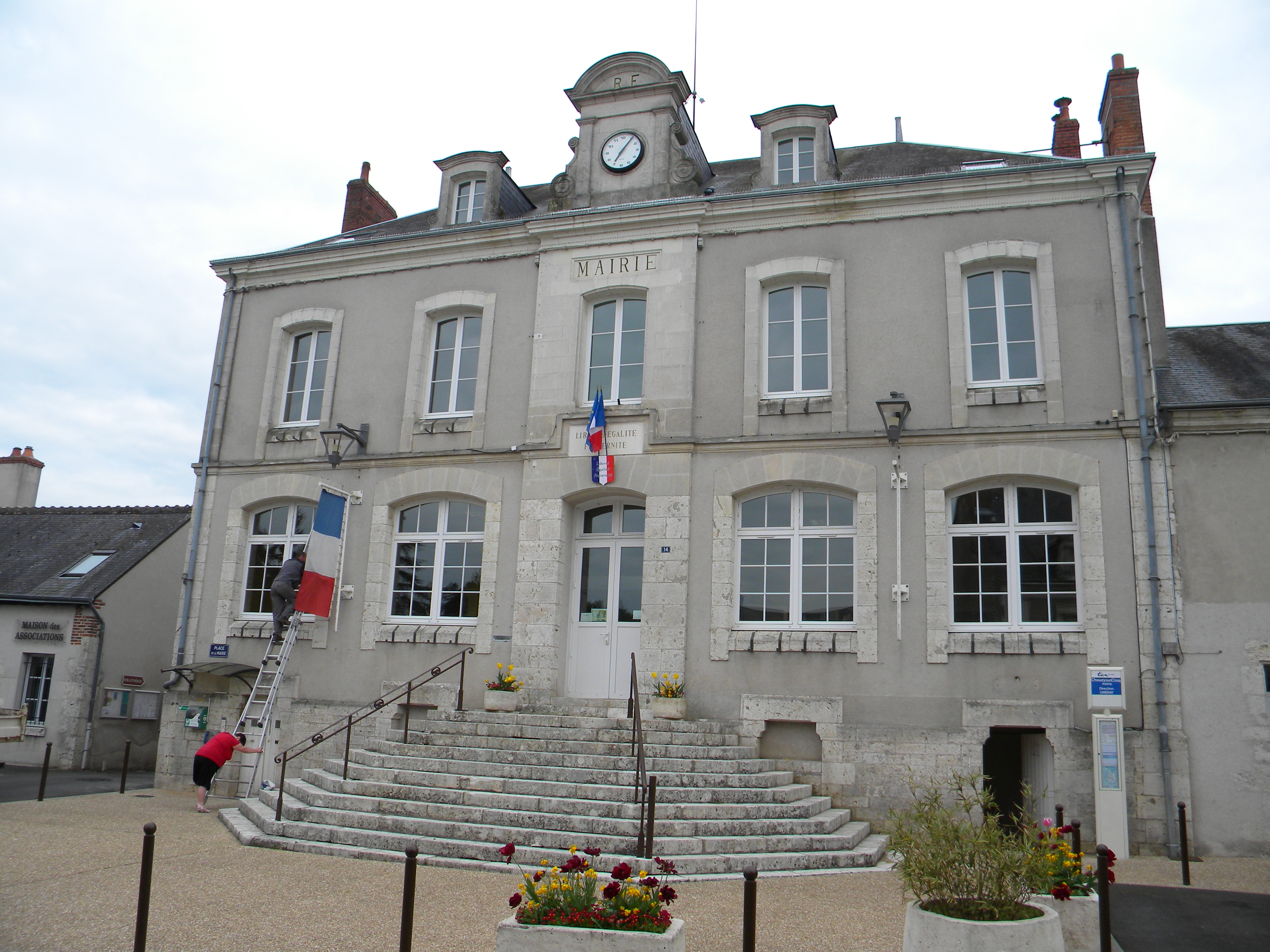 Urbodomo de Chouzy-sur-Cisse